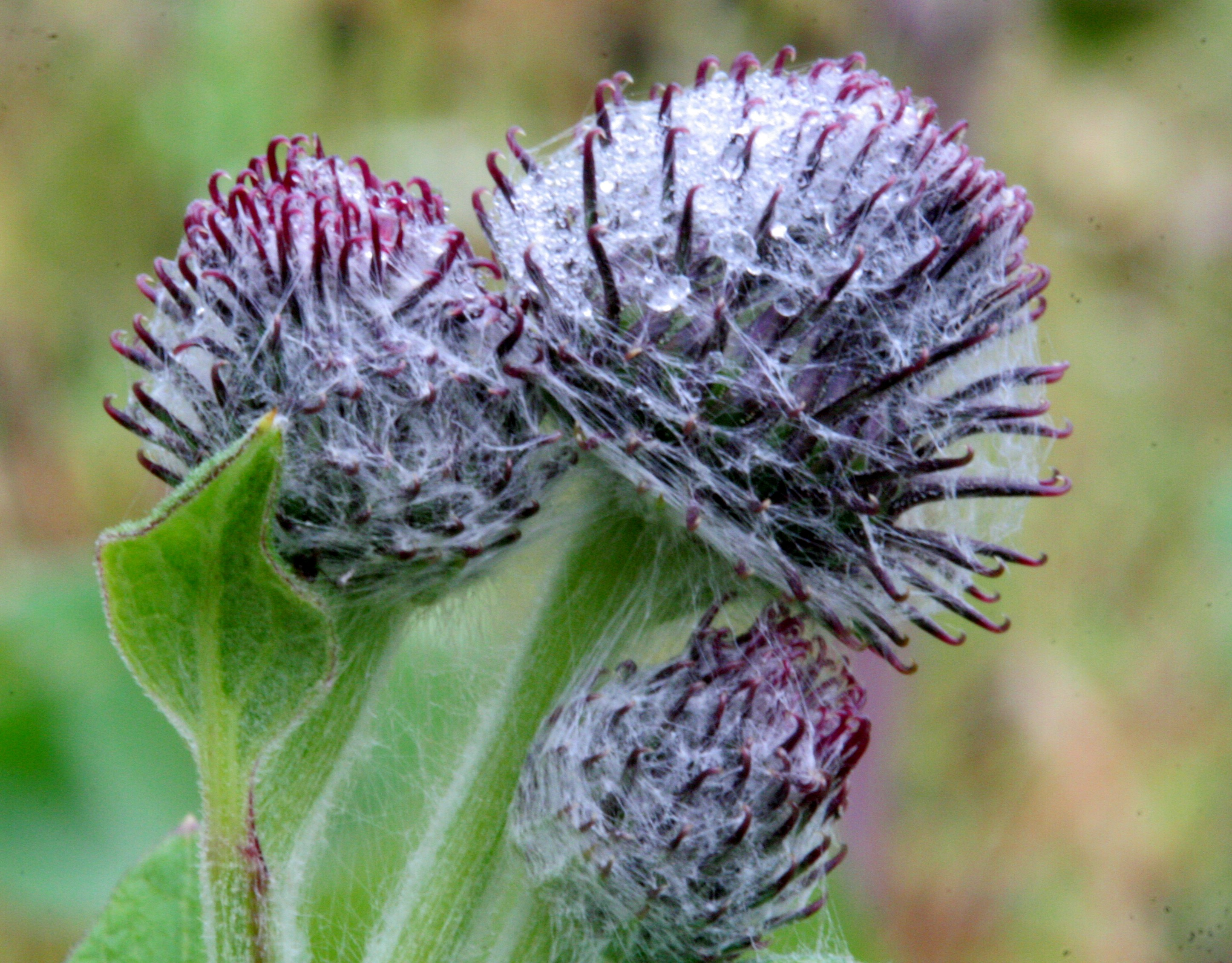 Arctium minus - Località: Cortina (BL), 1400 m s.l.m. - luglio 2008